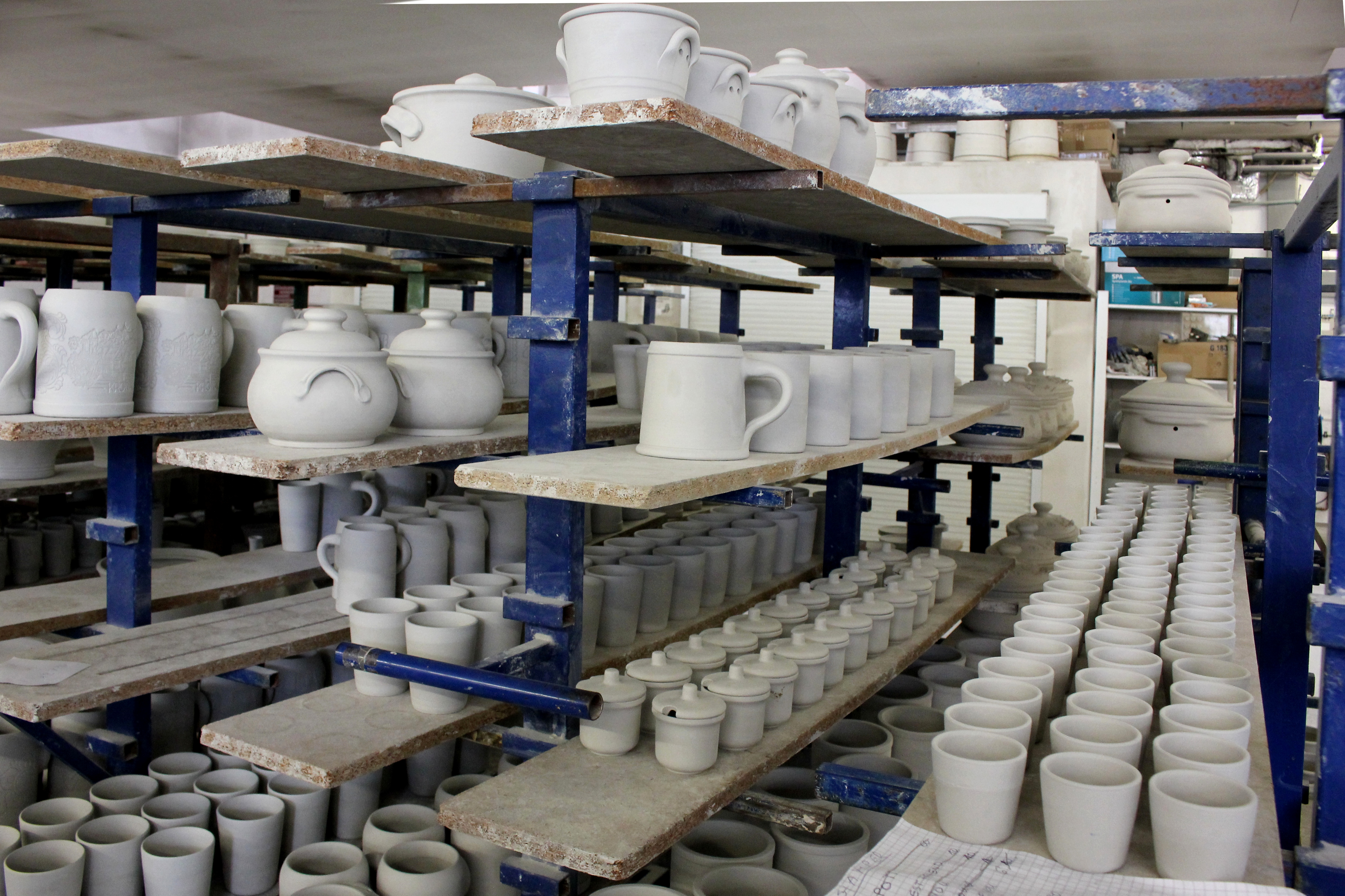 Steinzeug vor dem Brand in der Töpferei Girmscheid in Höhr-Grenzhausen